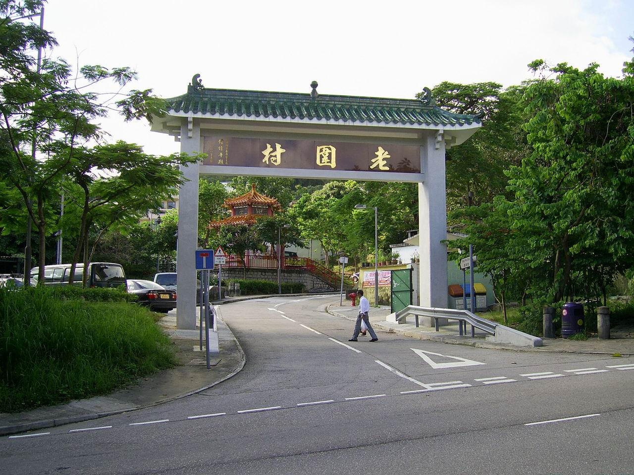 中文（香港）: 荃灣老圍村